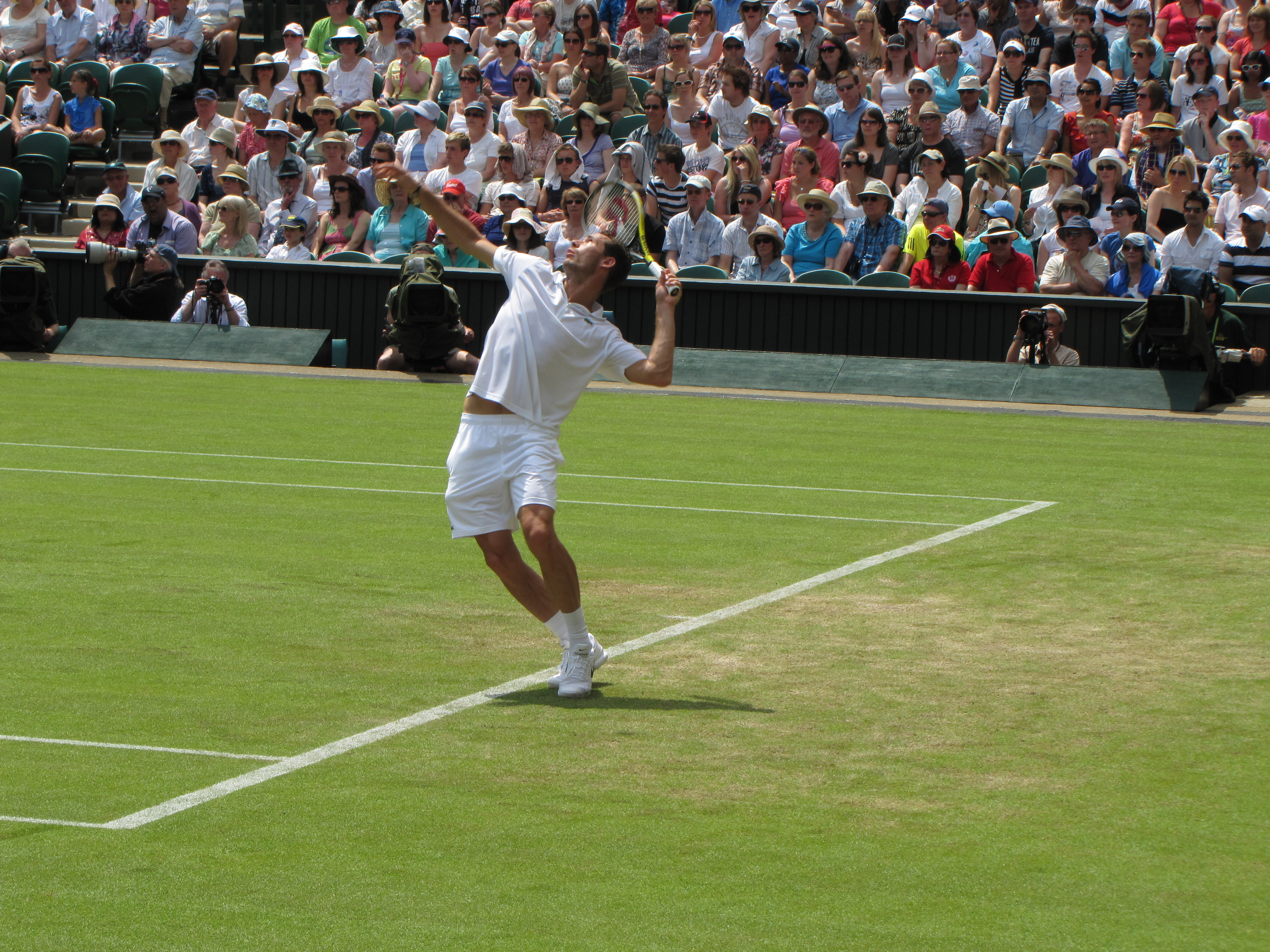 Michael Llodra - Wimbledon 2010